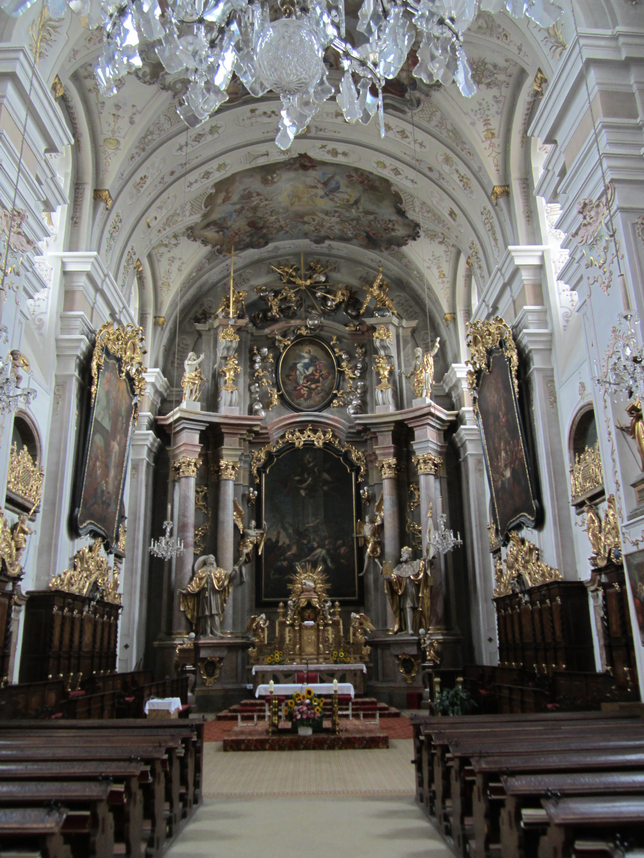 Object location48° 48′ 51.98″ N, 15° 17′ 04.81″ E